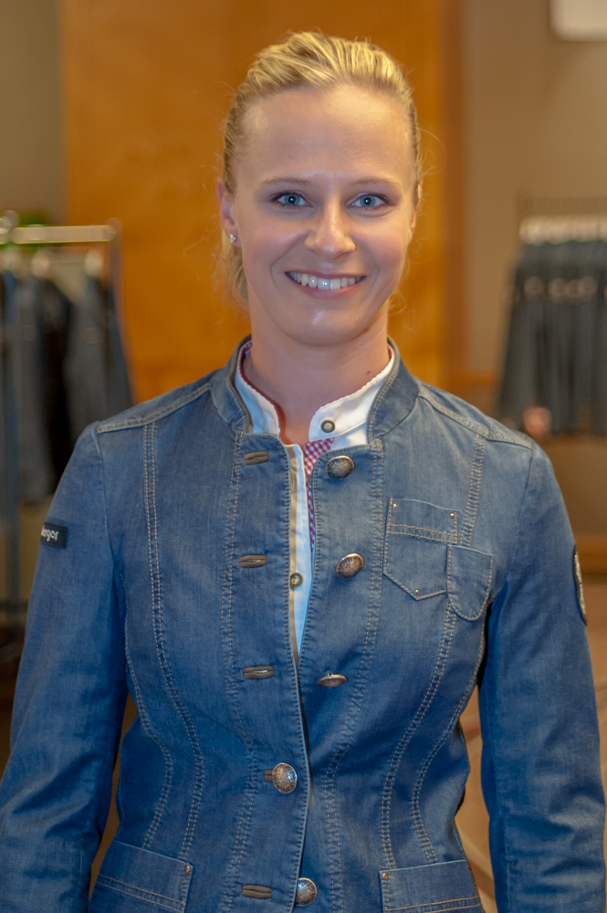 Einkleidung der Österreichischen Teilnehmer an den Olympischen Sommerspielen 2016 am 16./17. Juli 2016 in Wien. Bild zeigt Victoria Max-Theurer.